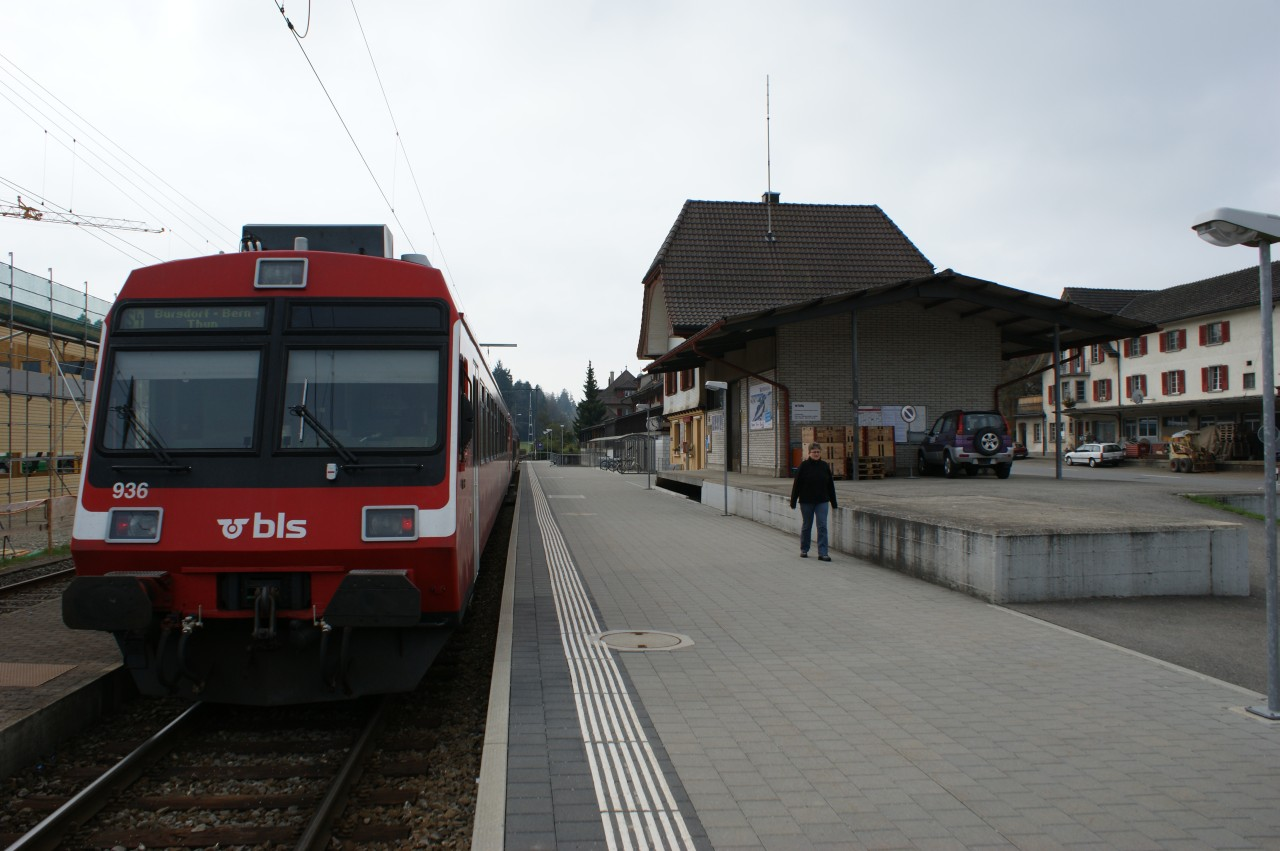 Bahnhof Affoltern-Weier im letzten Betriebsjahr der S4, ab Dezember 2009 fuhren hier nur noch Busse